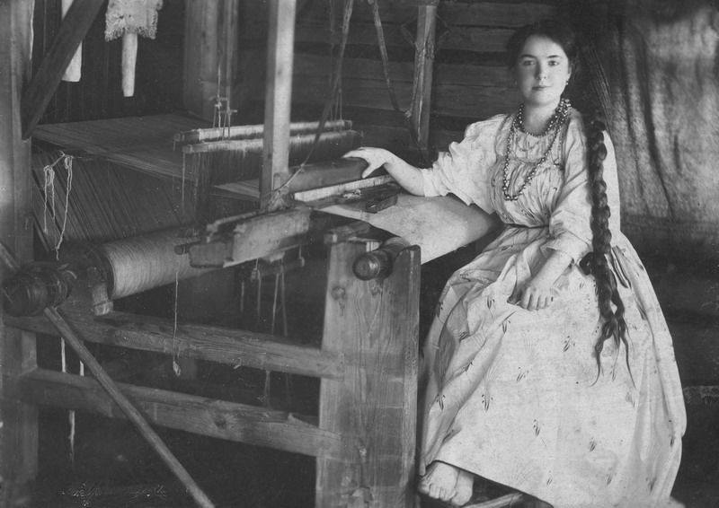 Крестьянка у ткацкого станка Александр Грюнблат, 1900-е, Костромская губ., Кинешемский у., из архива Кинешемского государственного художественно-исторического музея.